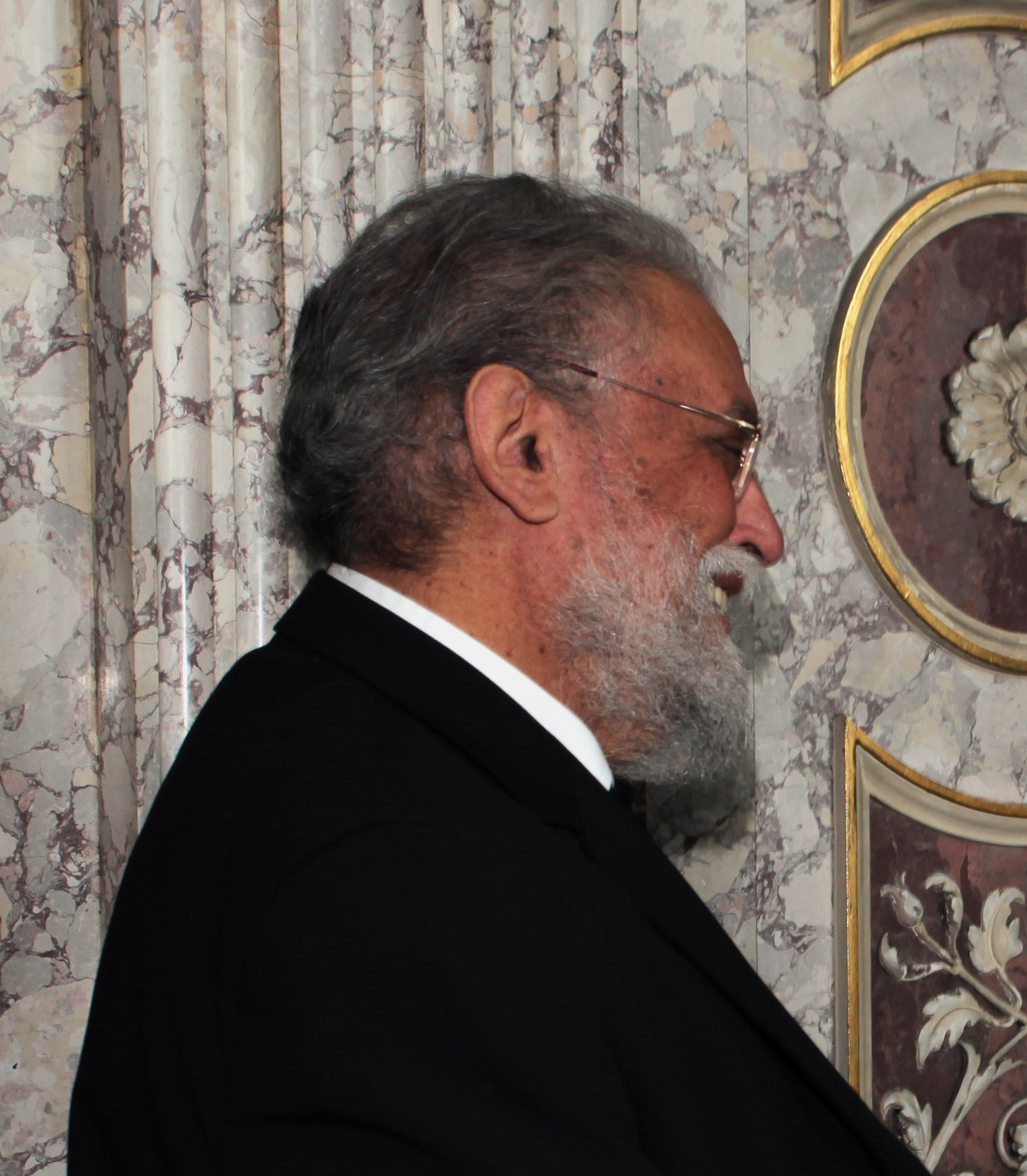 Συνάντη ΥΠΕΞ Δ. Δρούτσα με Μητροπολίτη Αυστρίας, Εξαρχο Ουγγαρίας και Μεσευρώπης Μιχαήλ (20.02.2011)